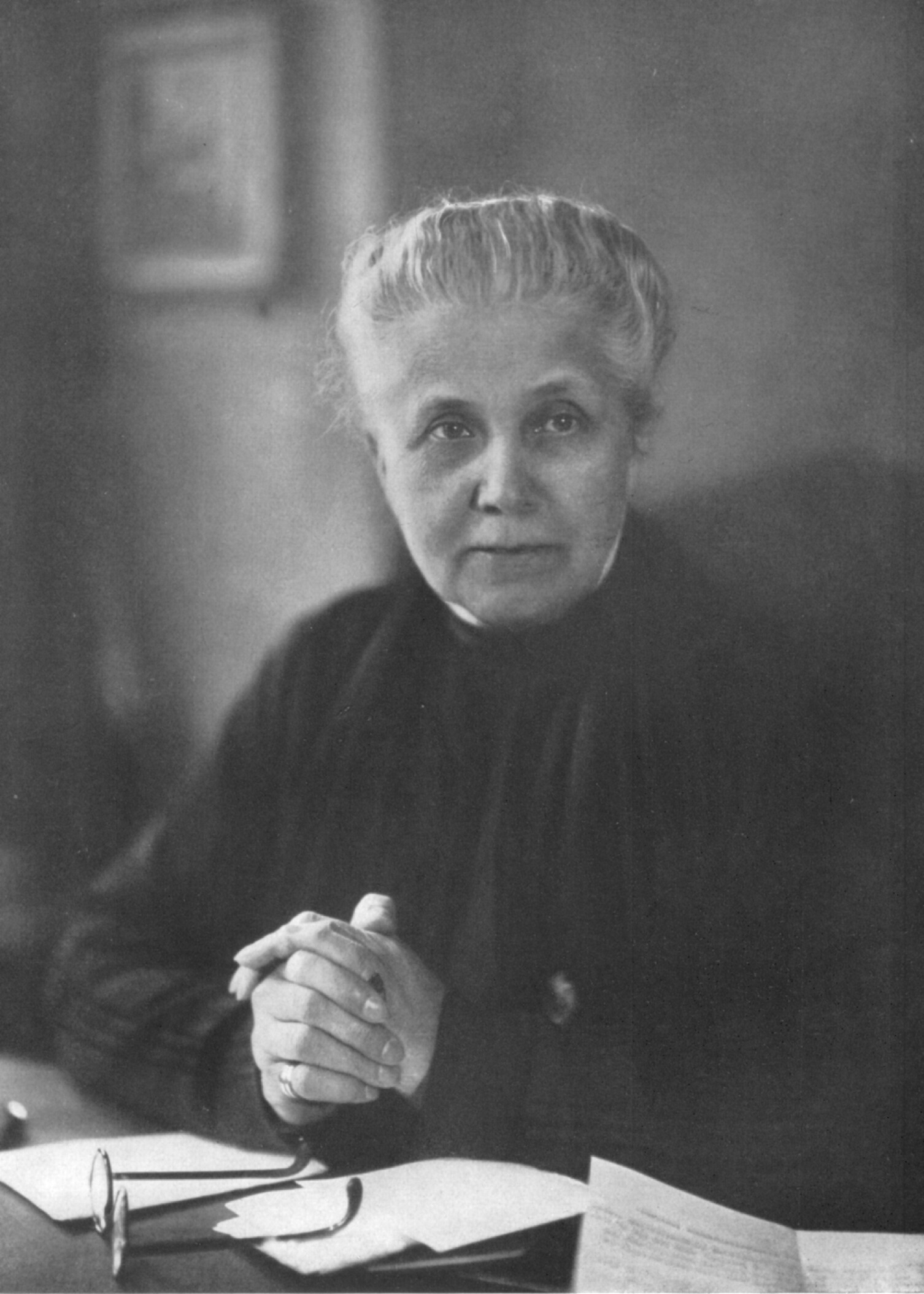 Porträt Selma von der Gröben, Foto von Wanda von Debschitz-Kunowski (1870-1935)